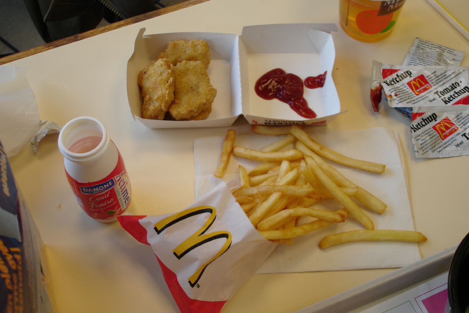 a week later